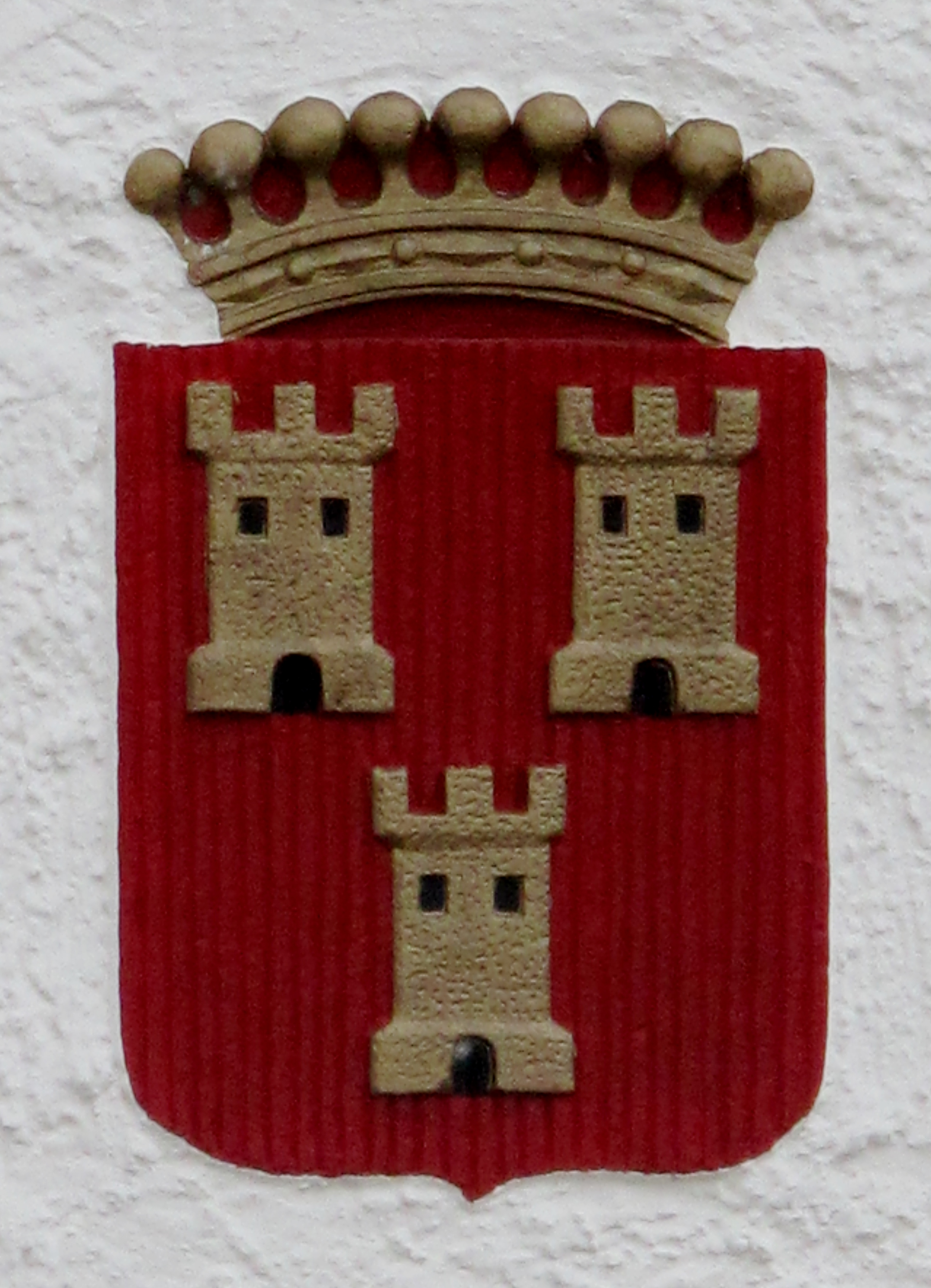 Château de Wolsfeld, Blason de la famille de Saintignon (ca. 1950).